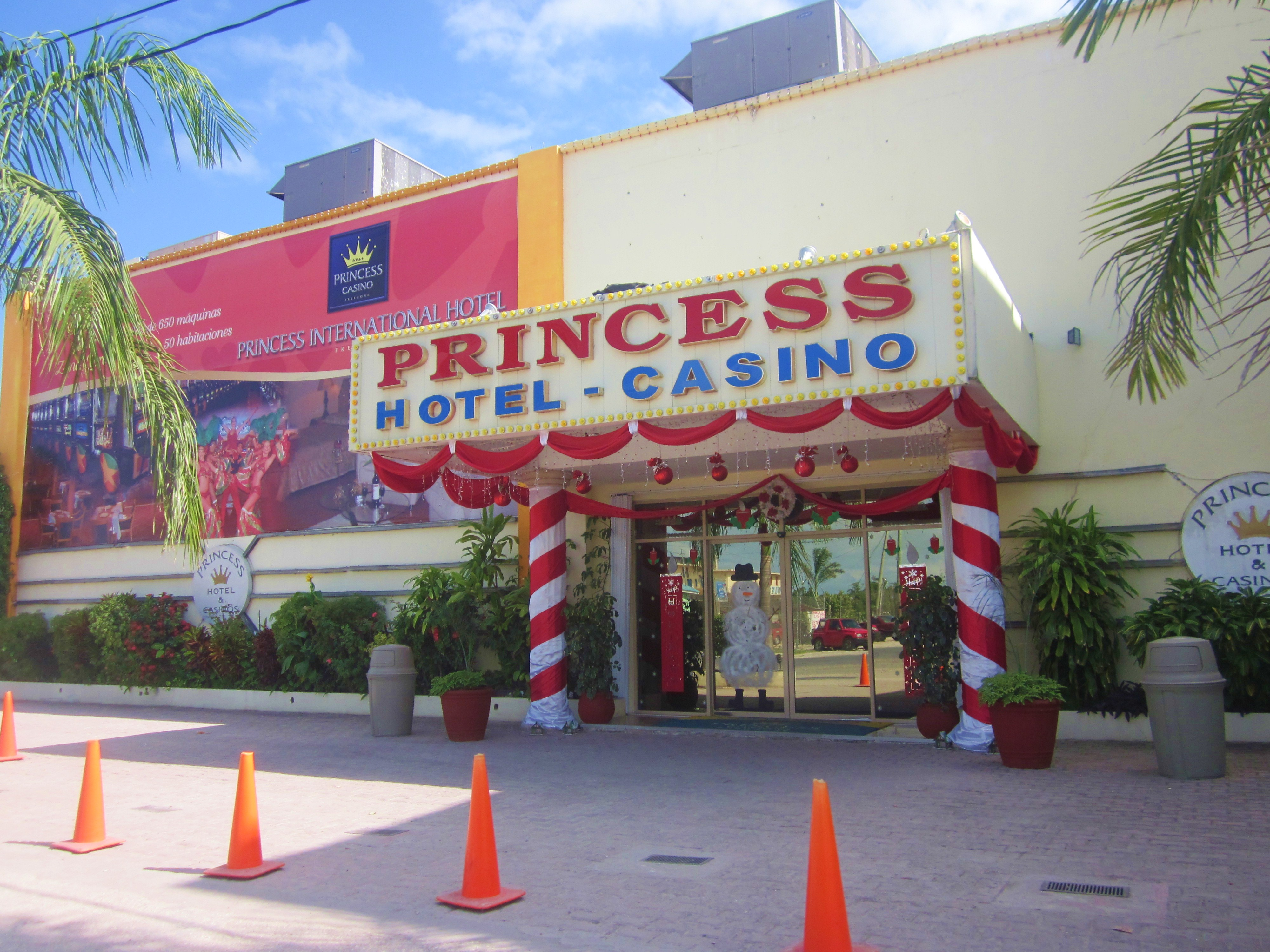 Princess, hotel y casino, Zona Libre.